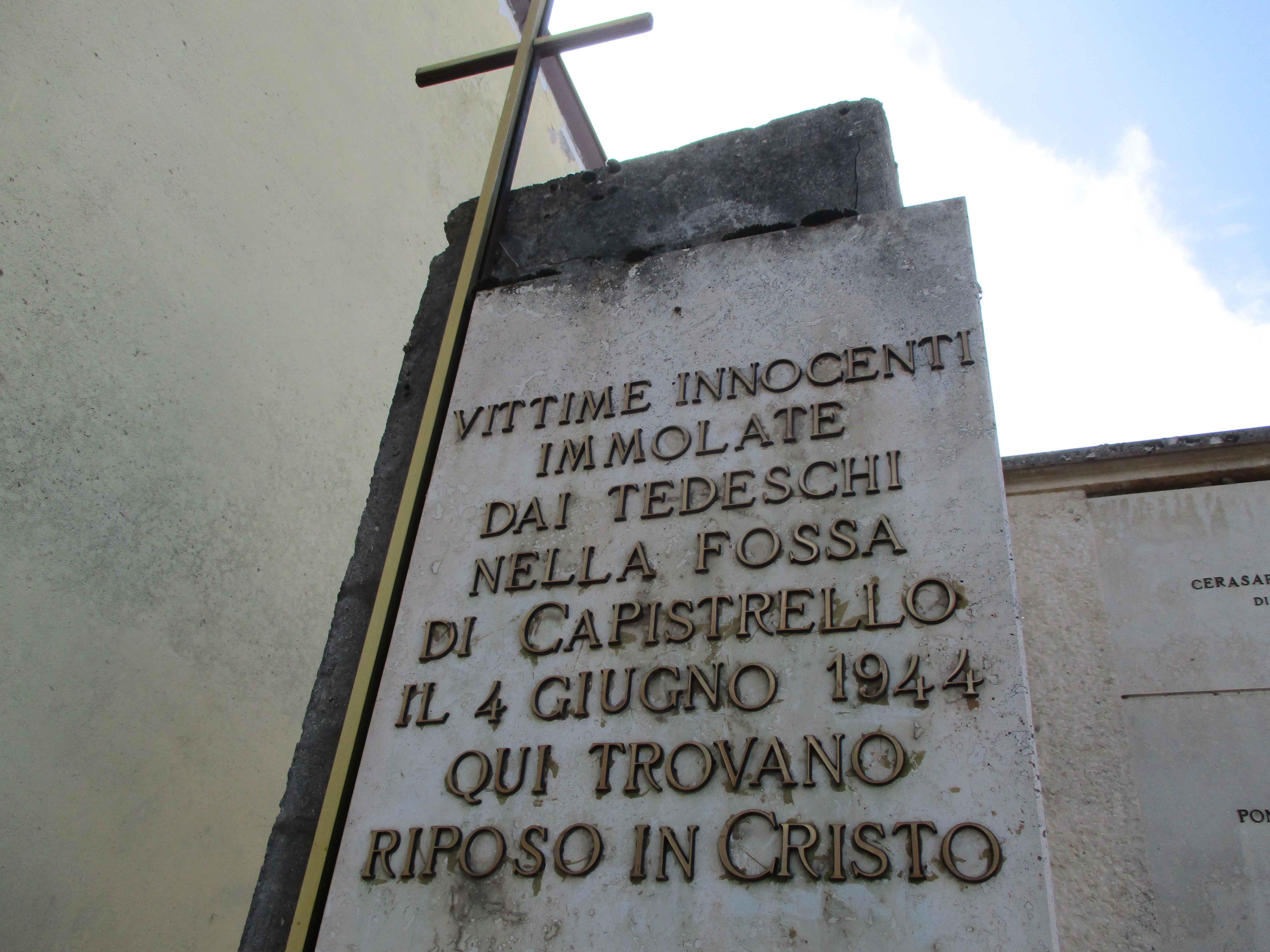 Targa dedicata ai 33 Martiri di Capistrello